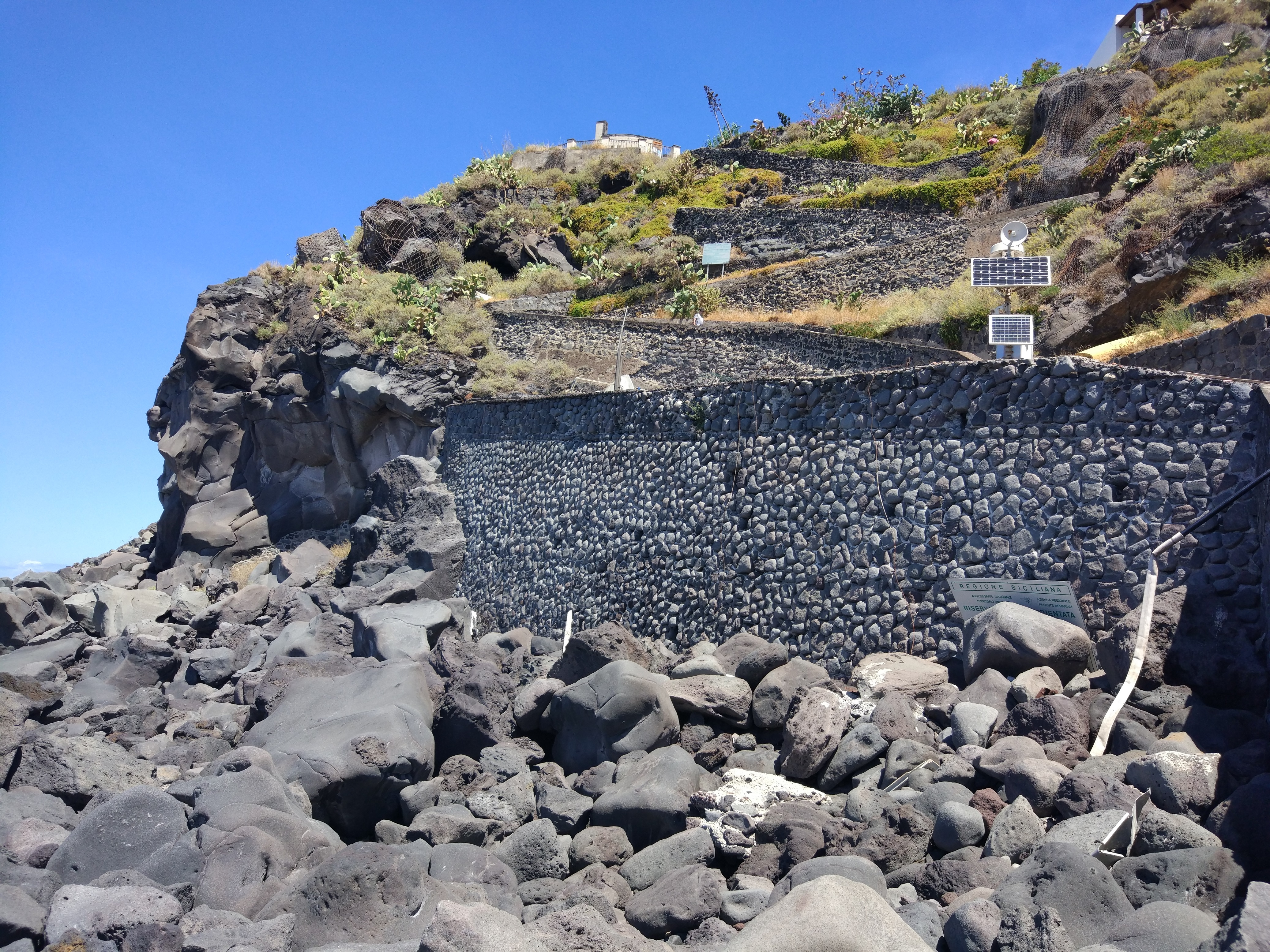 Ginostra from the port, May 2018